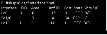 Монгол: Алдааны мессеж1